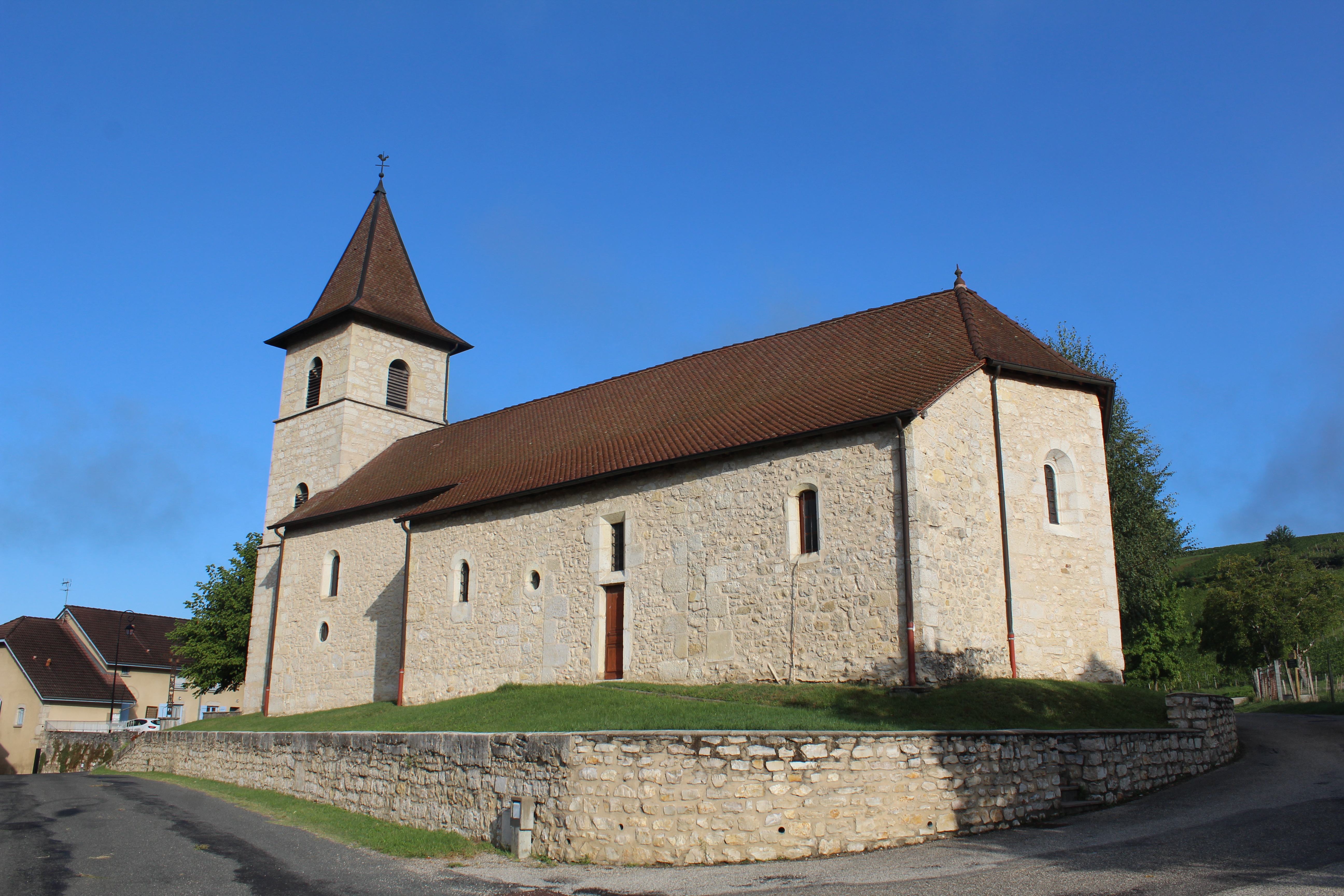 Église Saint-Cyriaque de Groslée, Groslée-Saint-Benoît.